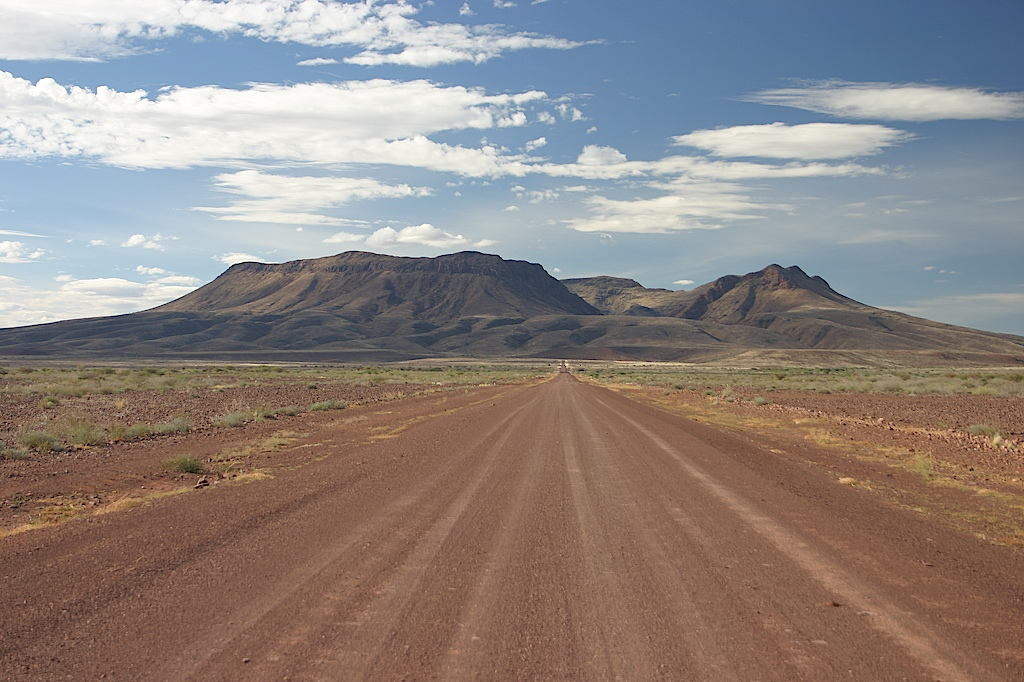 Der Brukkaros ist ein 1.603 m hoher, erloschener Vulkanberg bei Keetmanshoop, Namibia. Er entstand vor etwa 80 Millionen Jahren gegen Ende der Kreidezeit.